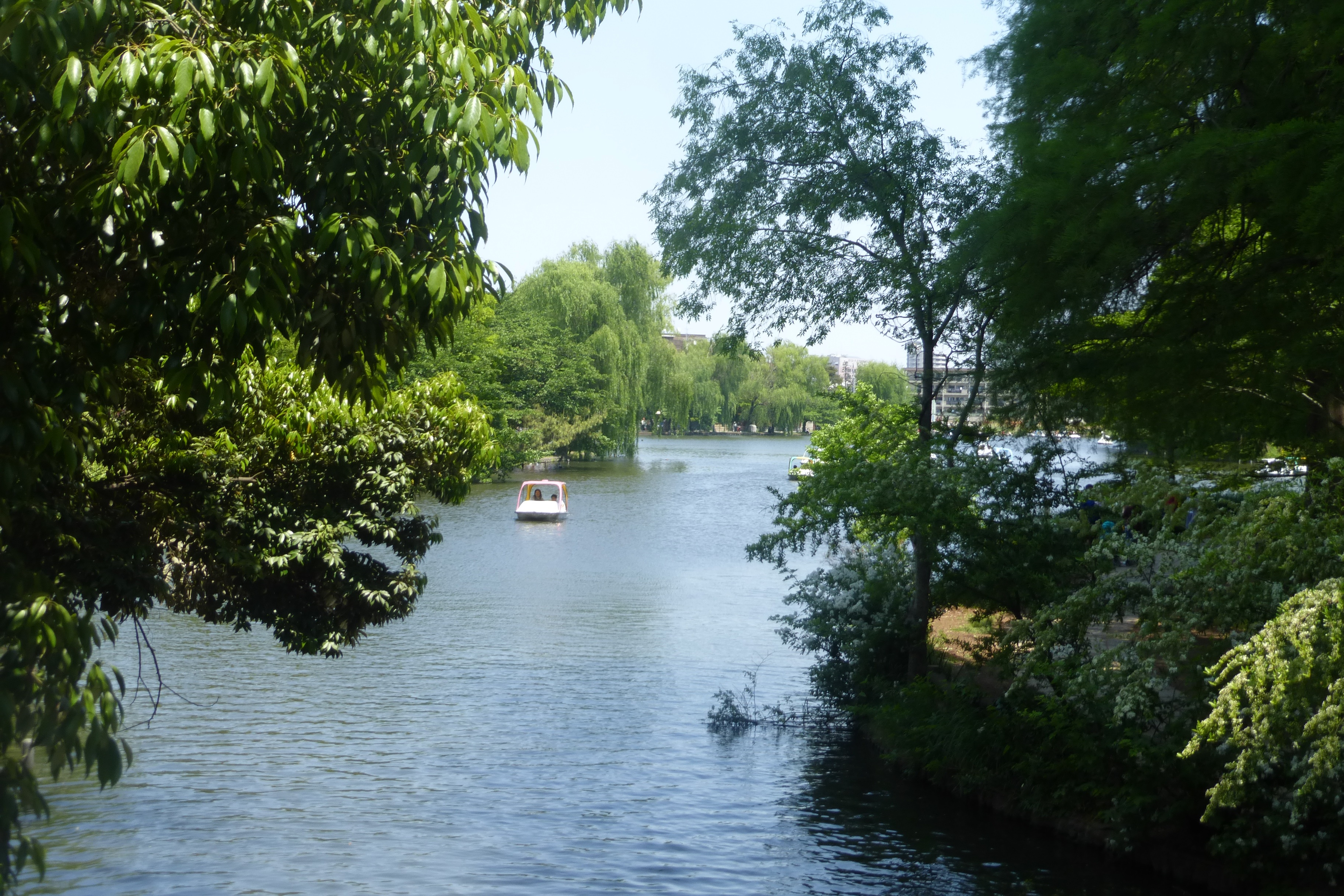 Shakujii Park (石神井公園)